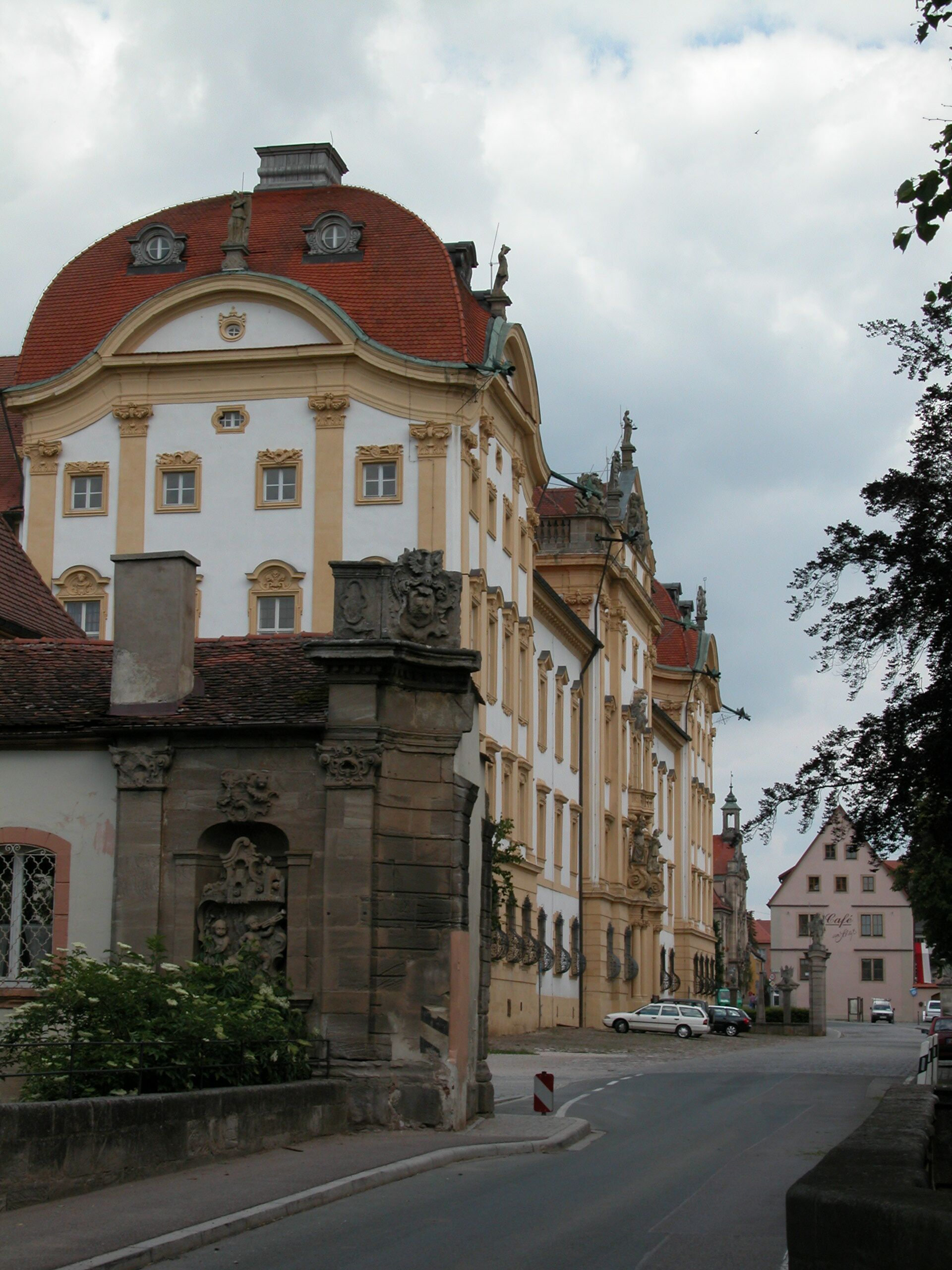 Deutschordensschloss Ellingen